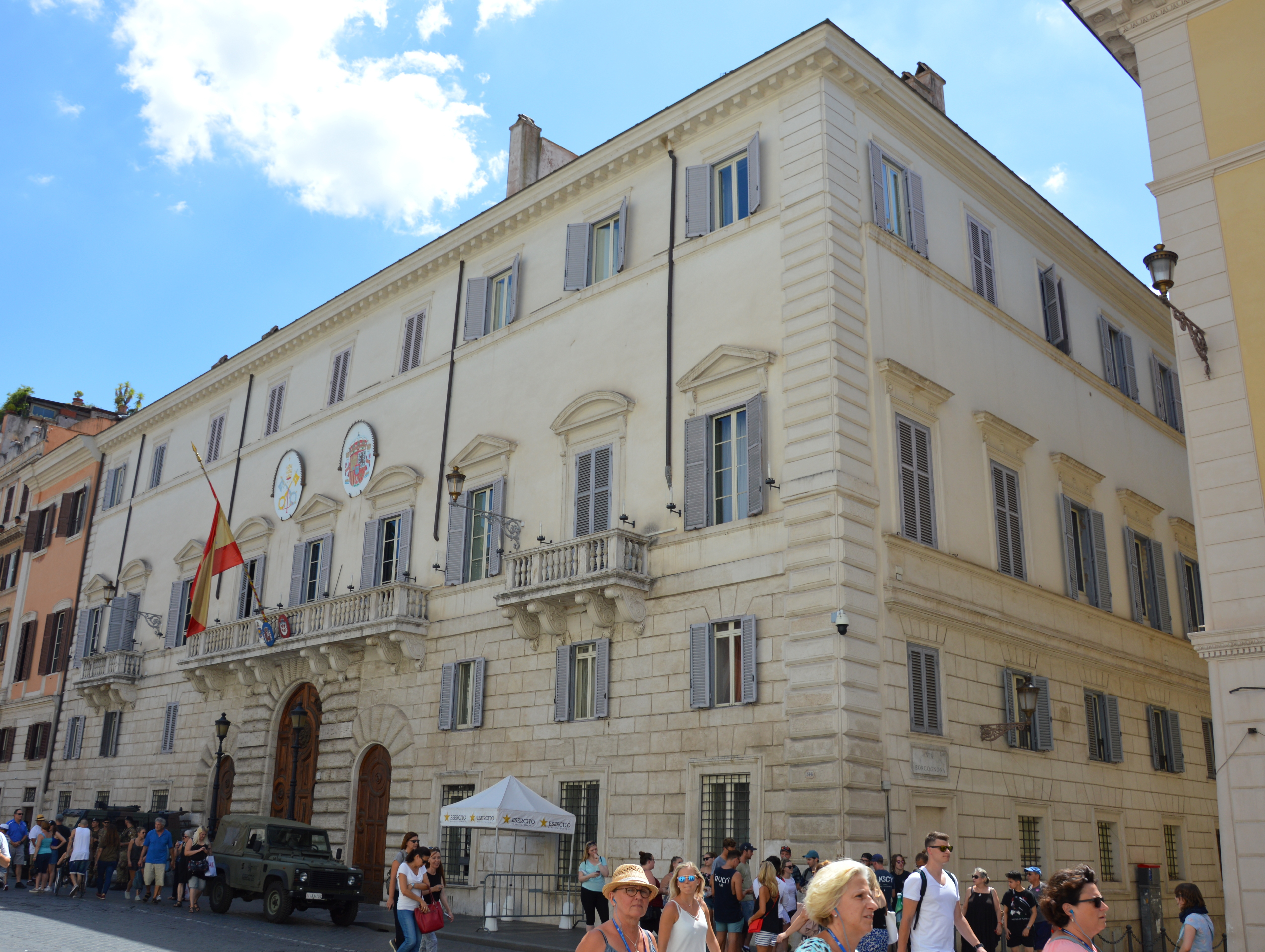 Spanische Botschaft beim Heiligen Stuhl in Rom